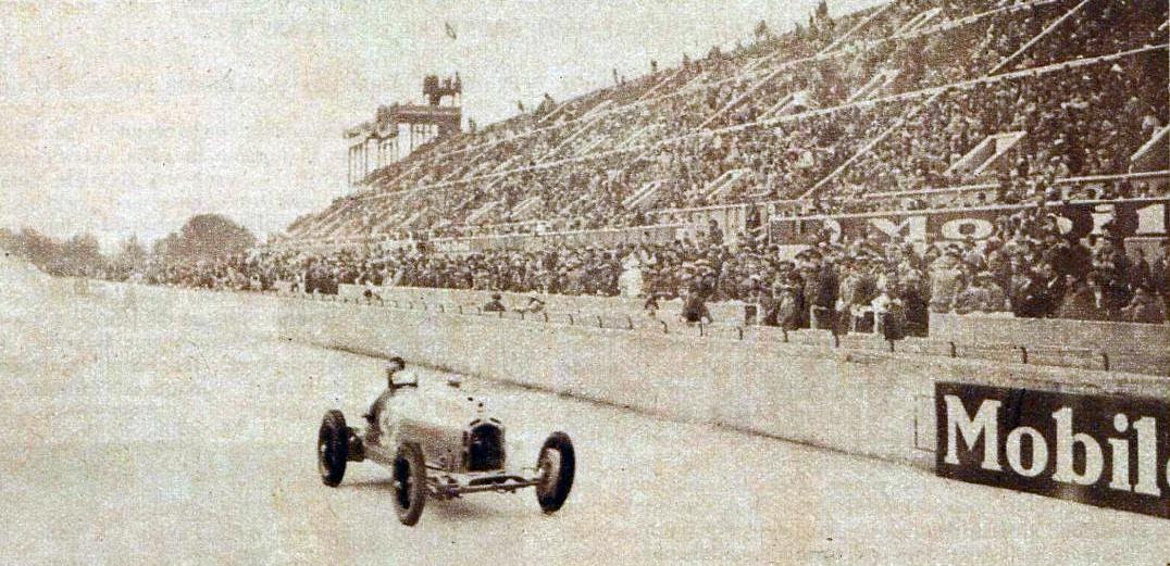 Raymond Sommer, quatrième du Grand Prix de l'A.C.F. 1933.